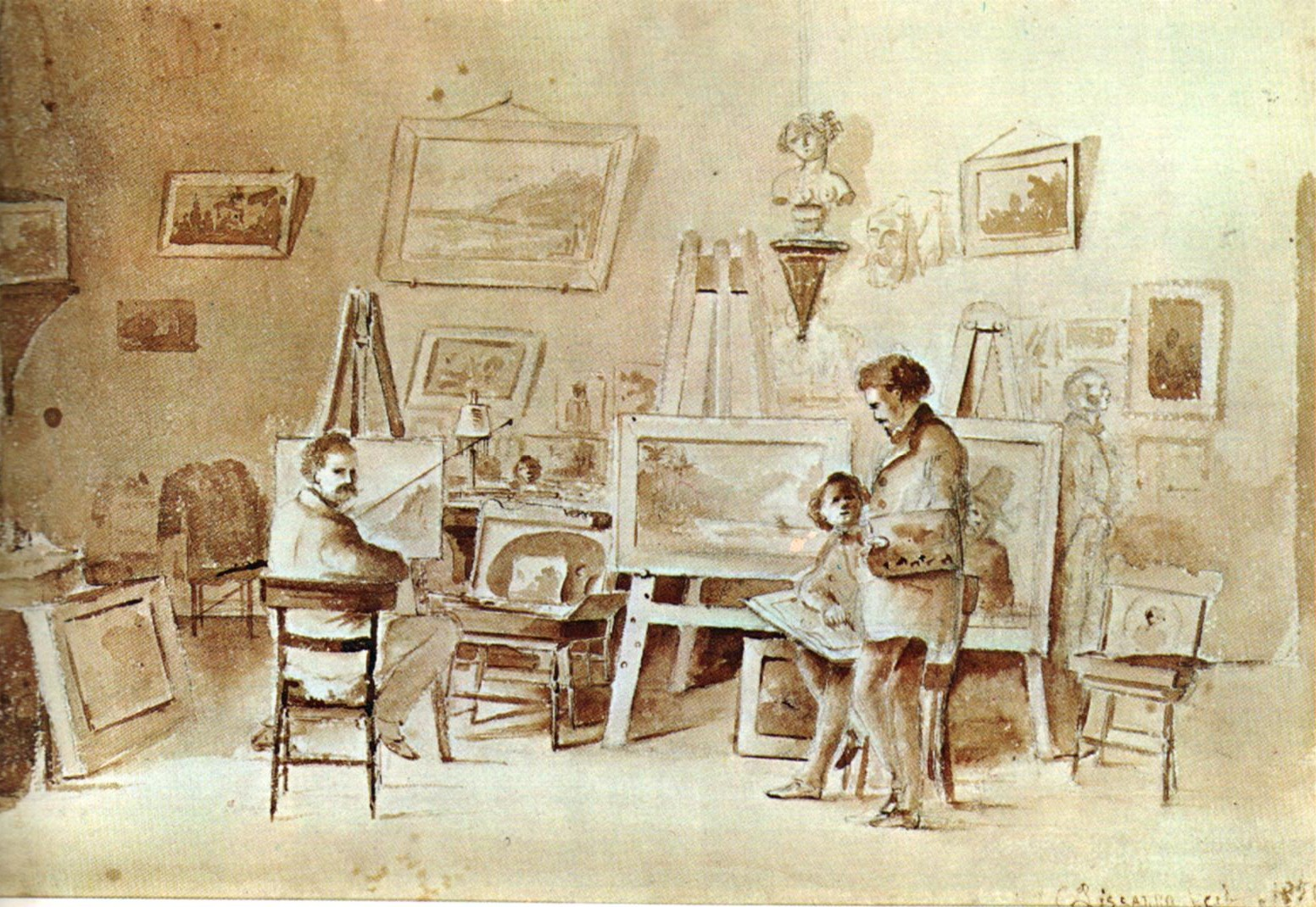 Camille Pissarro: Estudio del Artista en Saint Thomas (Melby aparece de pie a la derecha: al lado suyo, sentado esta el joven Pisarro. Sepia y lápiz (1851) Colección Banco Central de Venezuela Comprada en Hammer Galleries de New York en junio de 1965.